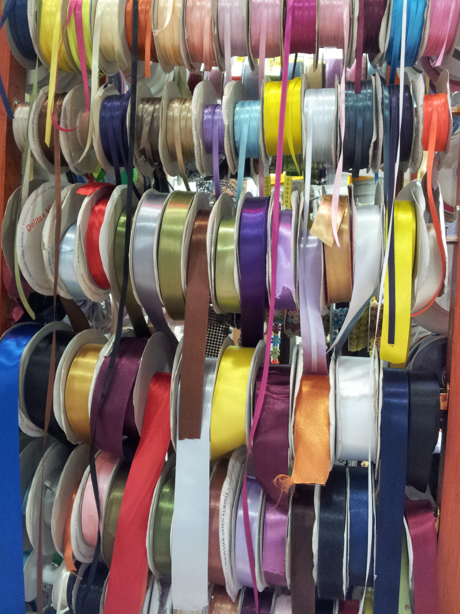 סרטים לתפירה בחנות בירושלים, ישראל